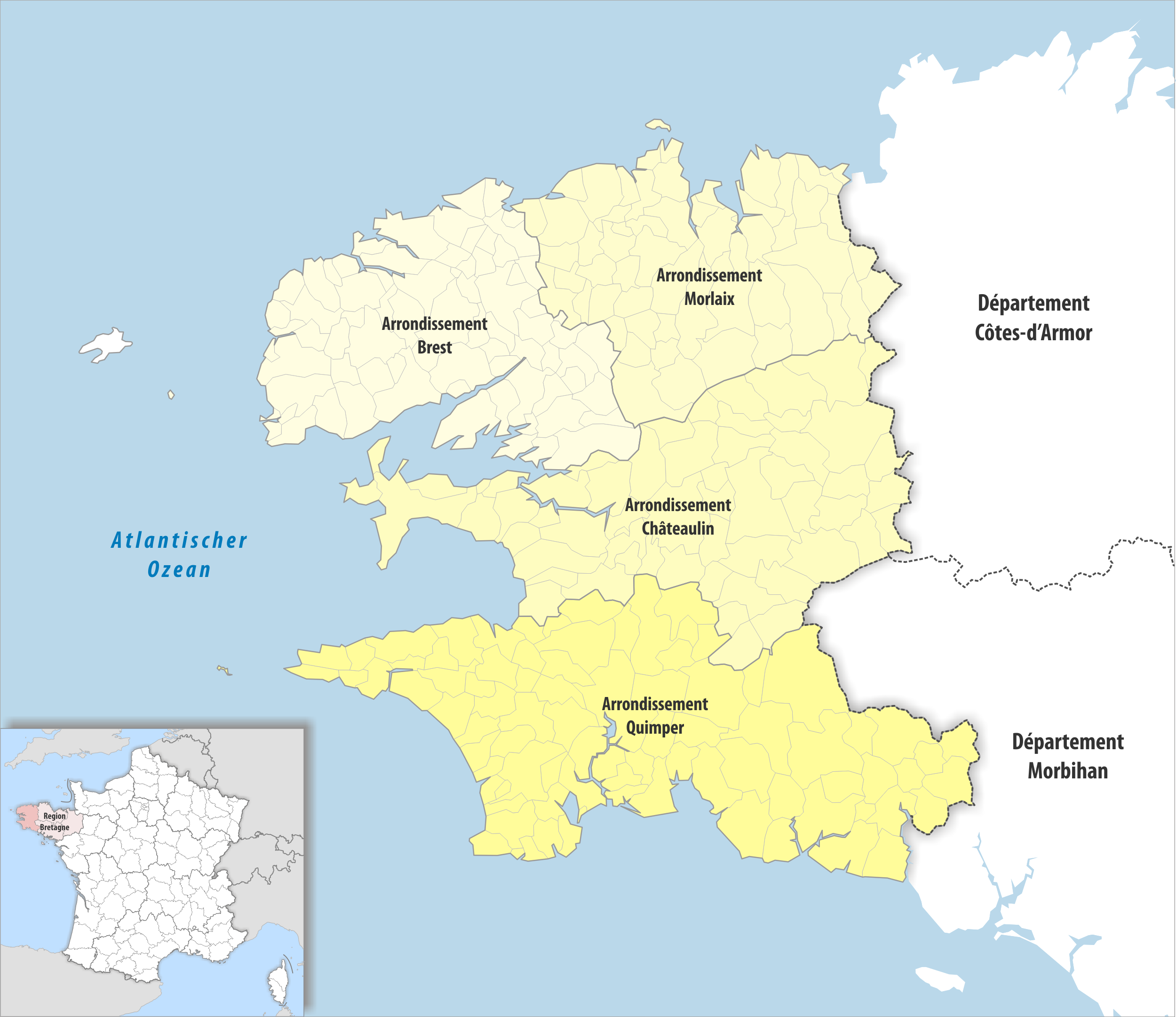 Gemeinden und Arrondissemente im Departement Finistère